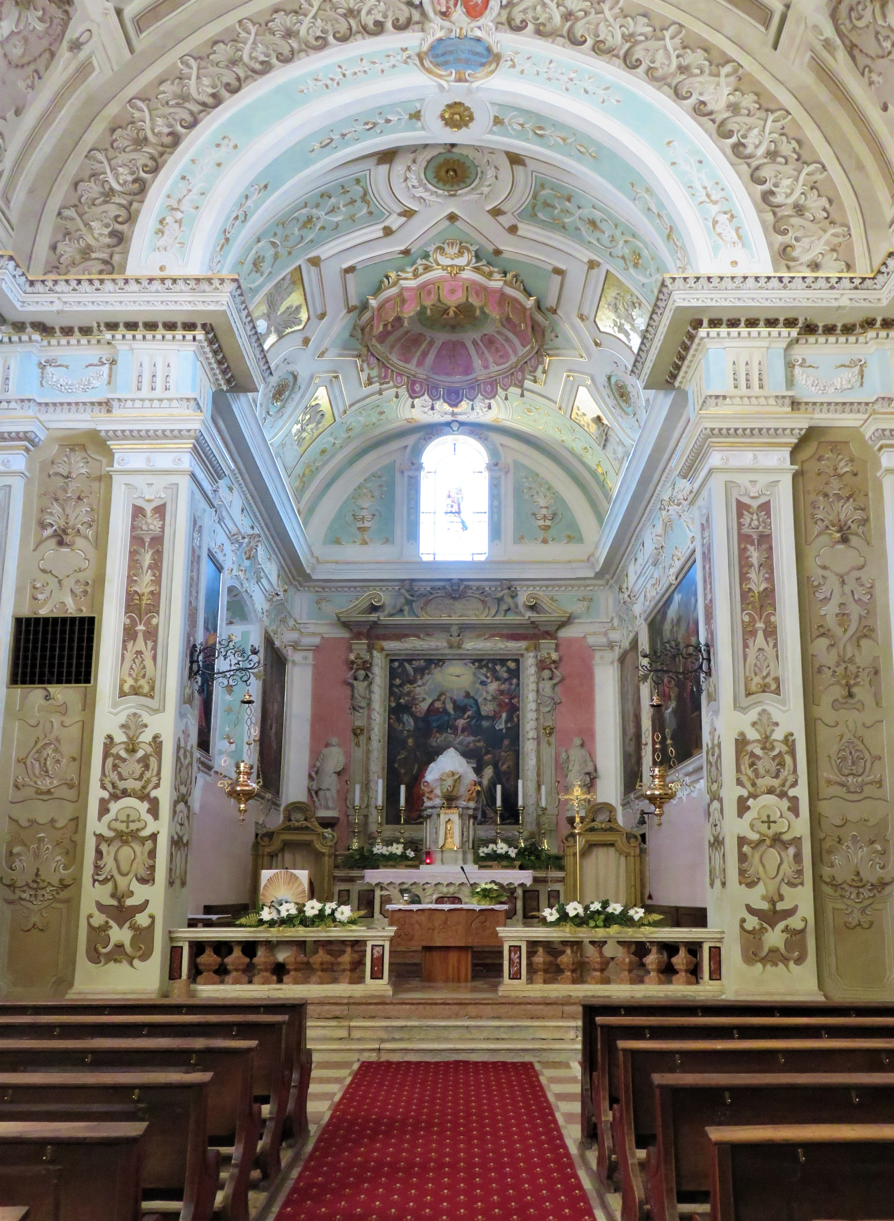 navata con altar maggiore